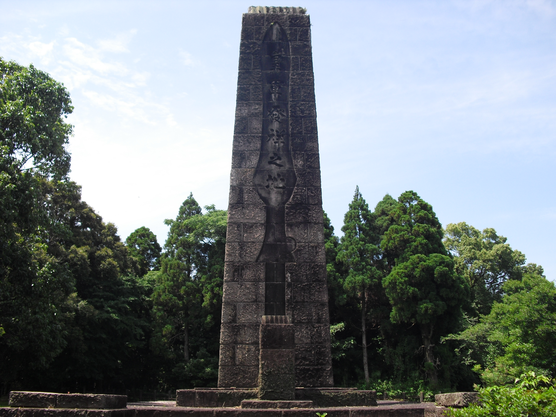 皇軍発祥の碑（2012年6月）